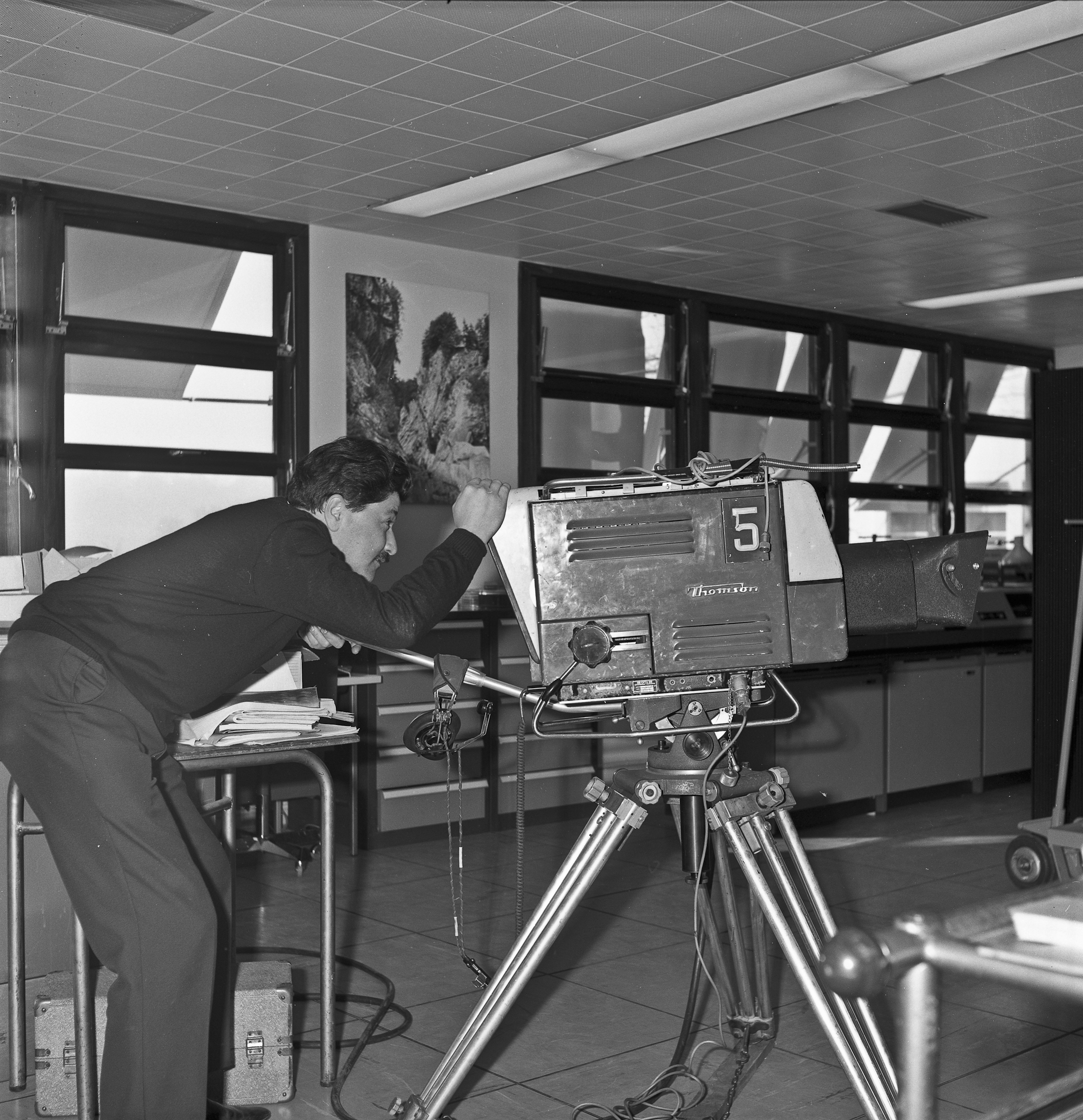 Reportage, réalisé pour l'émission télévisée Entre hier et demain dirigée par Alexandre Tarta, par une équipe de journalistes de l'ORTF en 1969 à l'INRA La Minière et au CNRZ de Jouy-en-Josas en 1969.